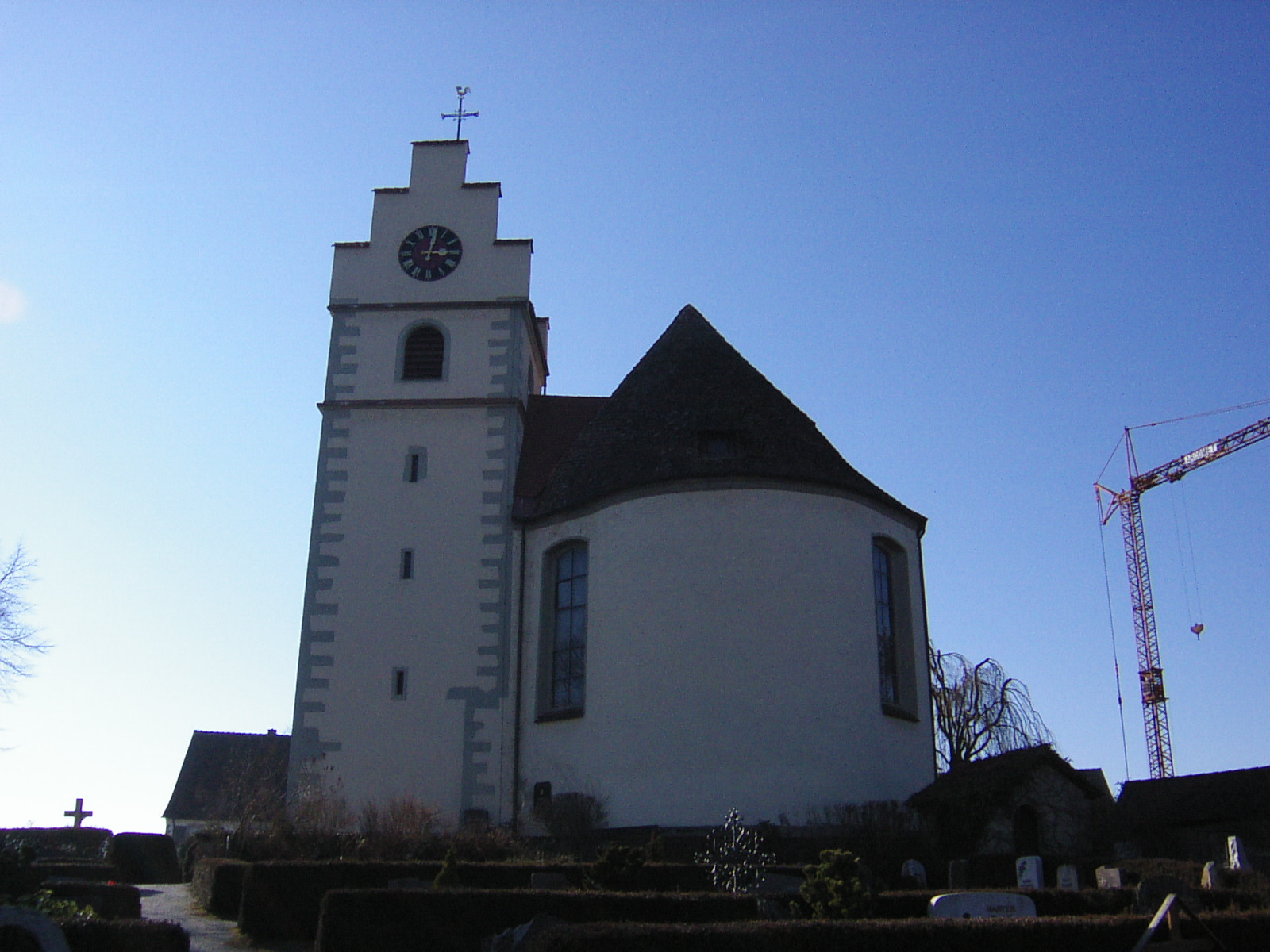 Pfarrkirche St. Johann der Täufer und Veit in Horn bei Gaienhofen, Konstanz